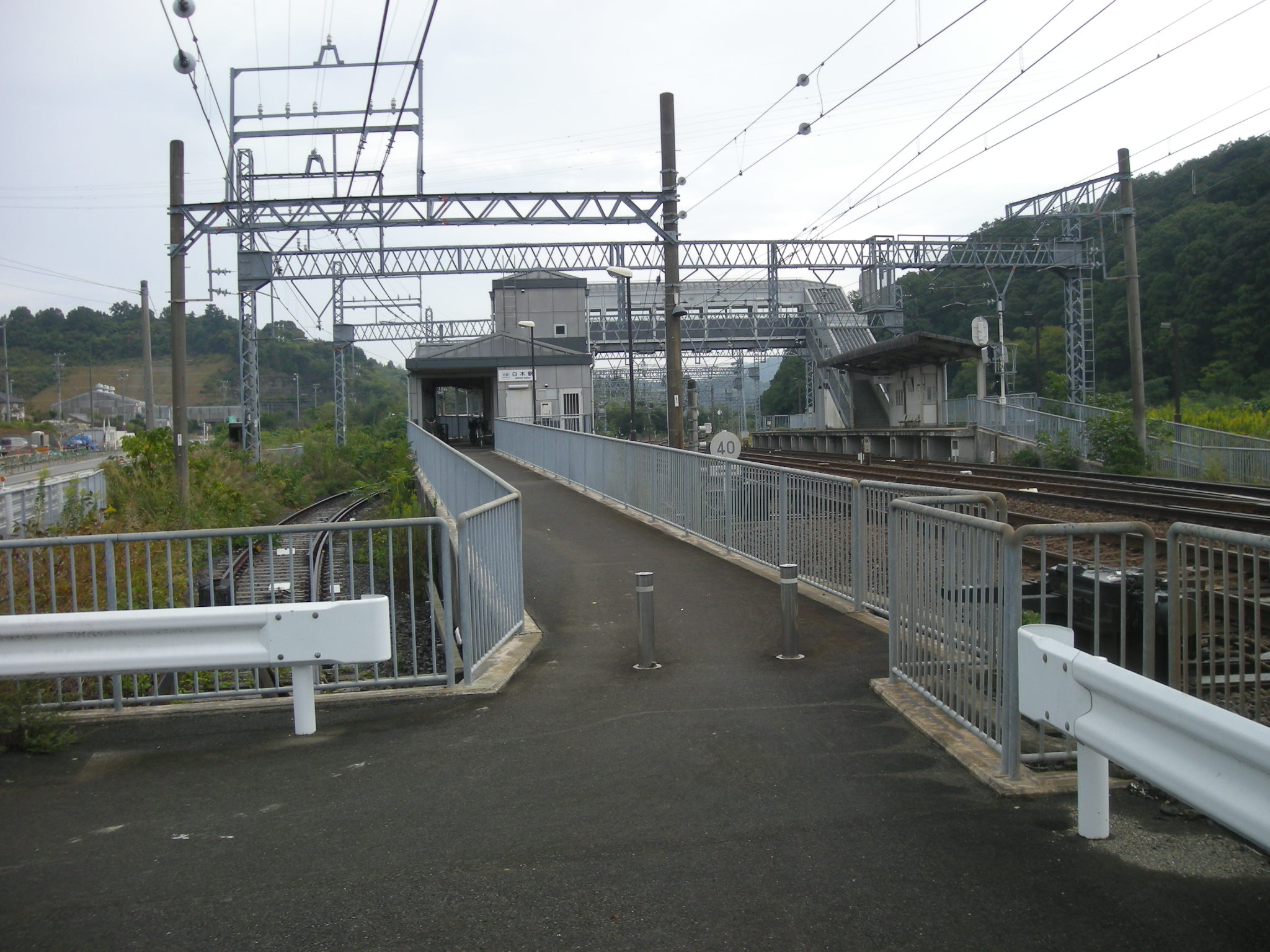 Shiraki Station, Toba, Mie, Japan